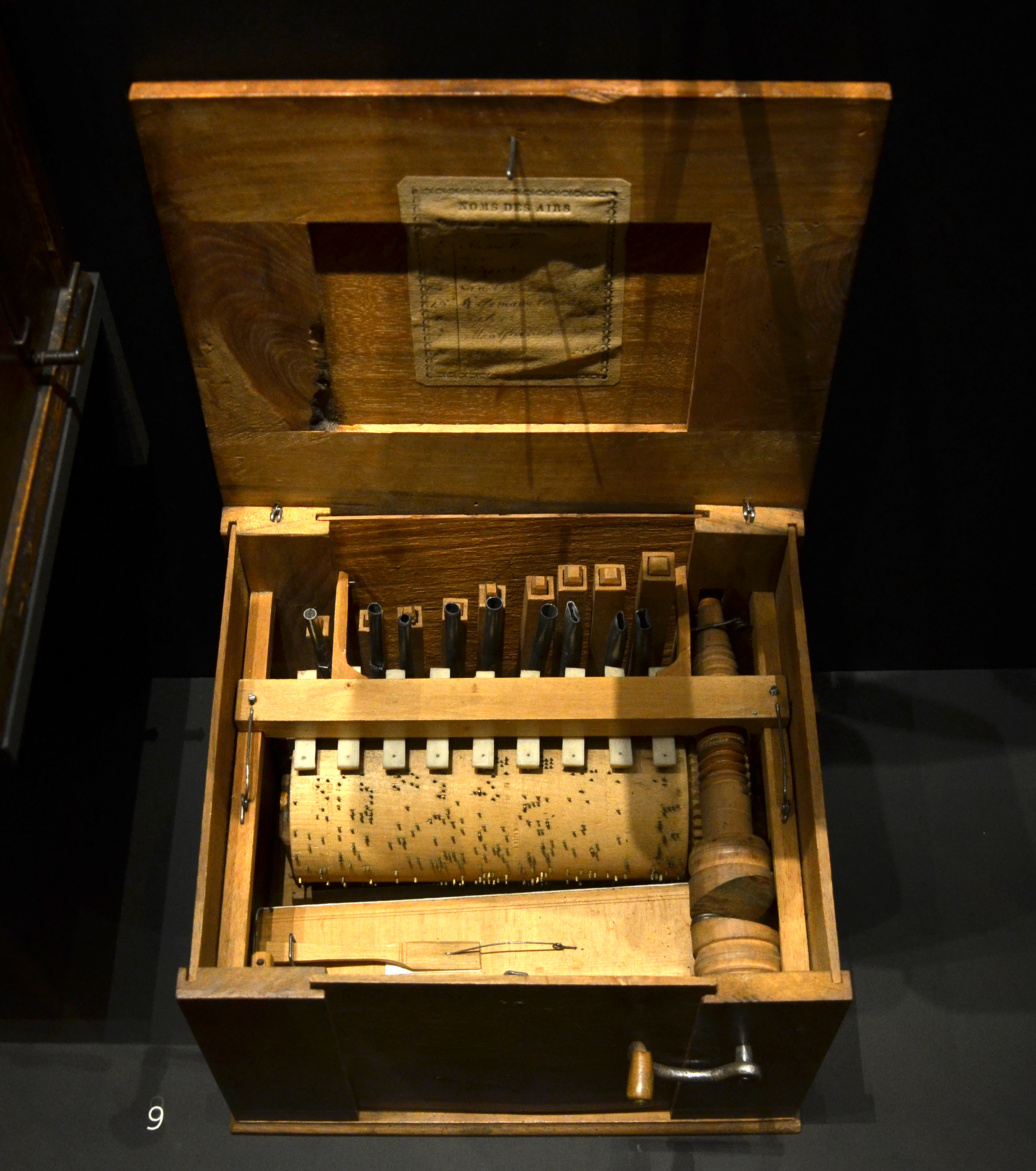 Serinette, datant de 1768 et provenant de Bâle. Musée de la Musique de Bâle.